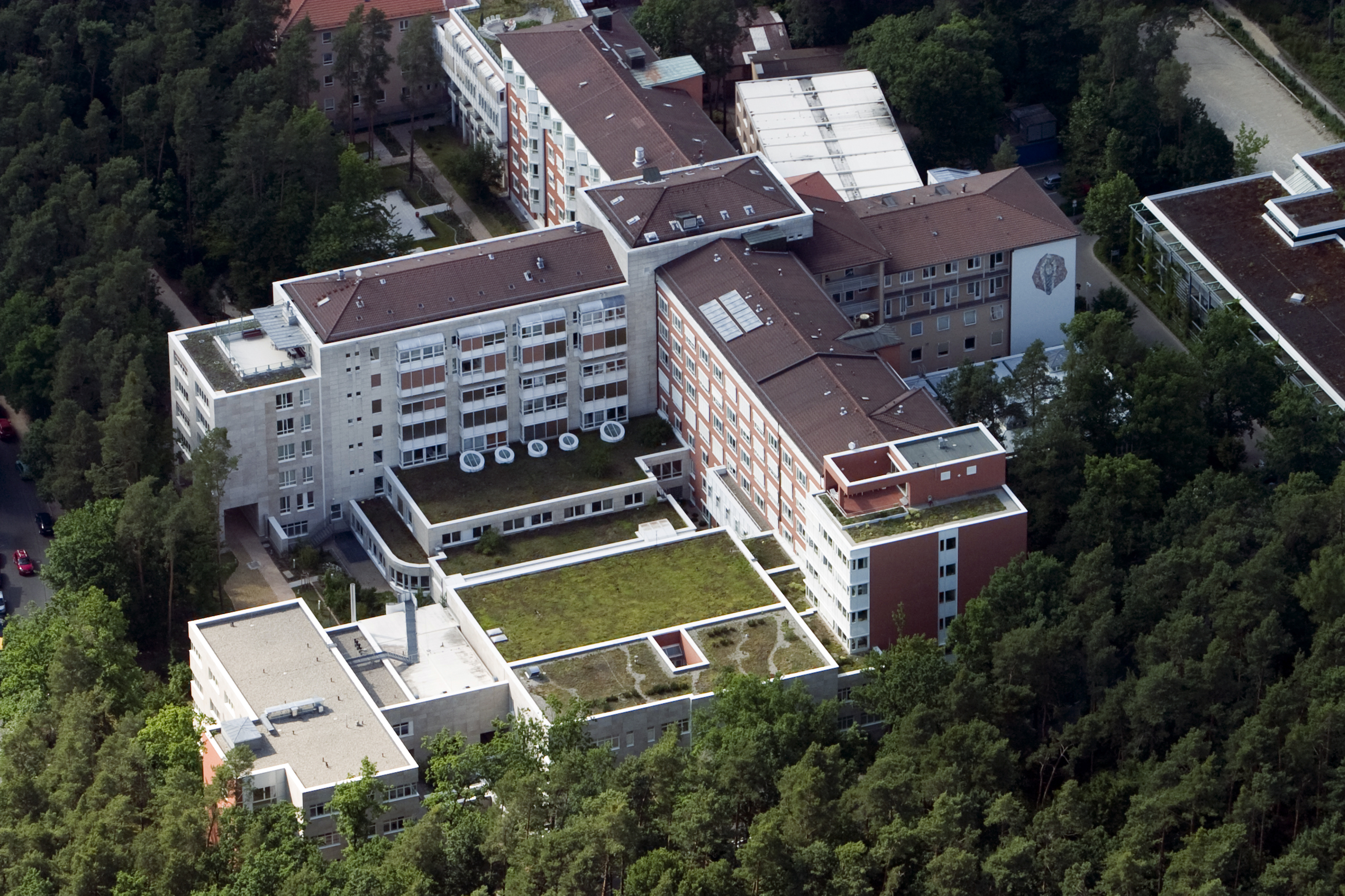 Waldkrankenhaus St. Marien Erlangen Luftaufnahme von Nord/Ost